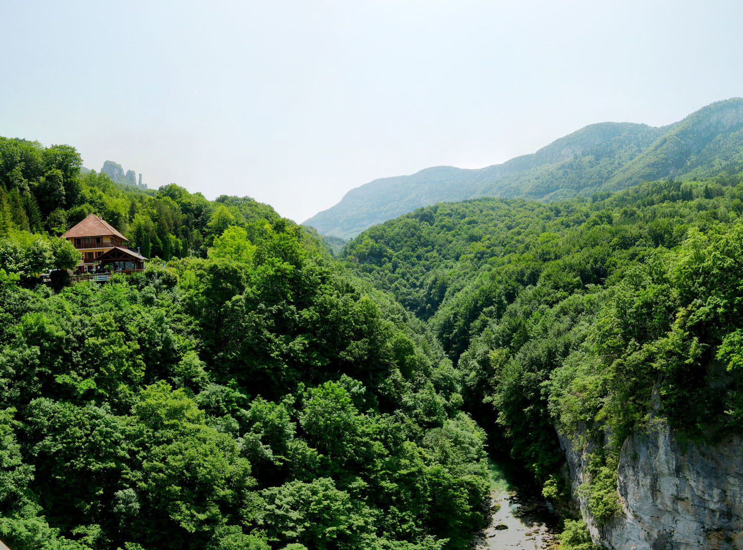 Cluse du Chéran, vue depuis le Pont de l'Abime, Massif des Bauges, Savoie, France. Au fond à gauche, les tours Saint-Jacques.